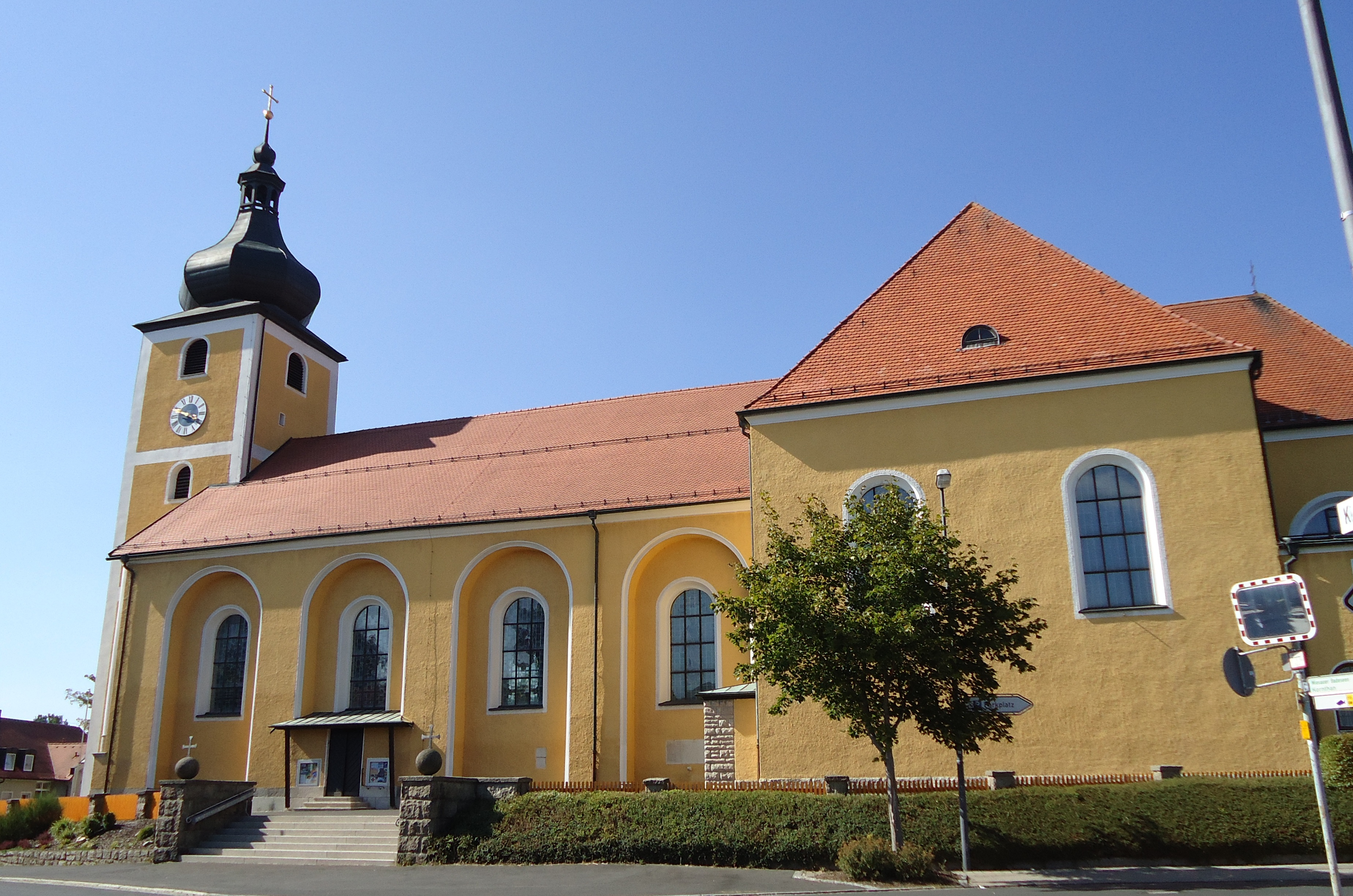 Pfarrkirche St. Michael in Wiesau